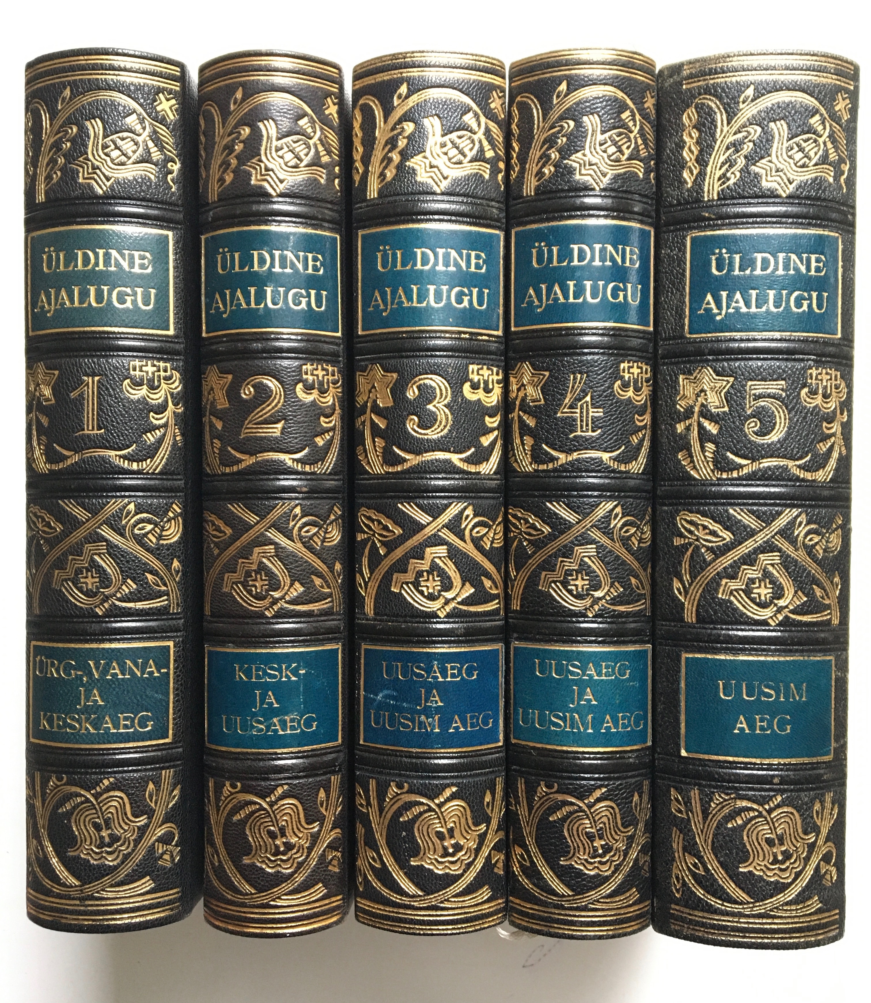 Pihlakas näidis